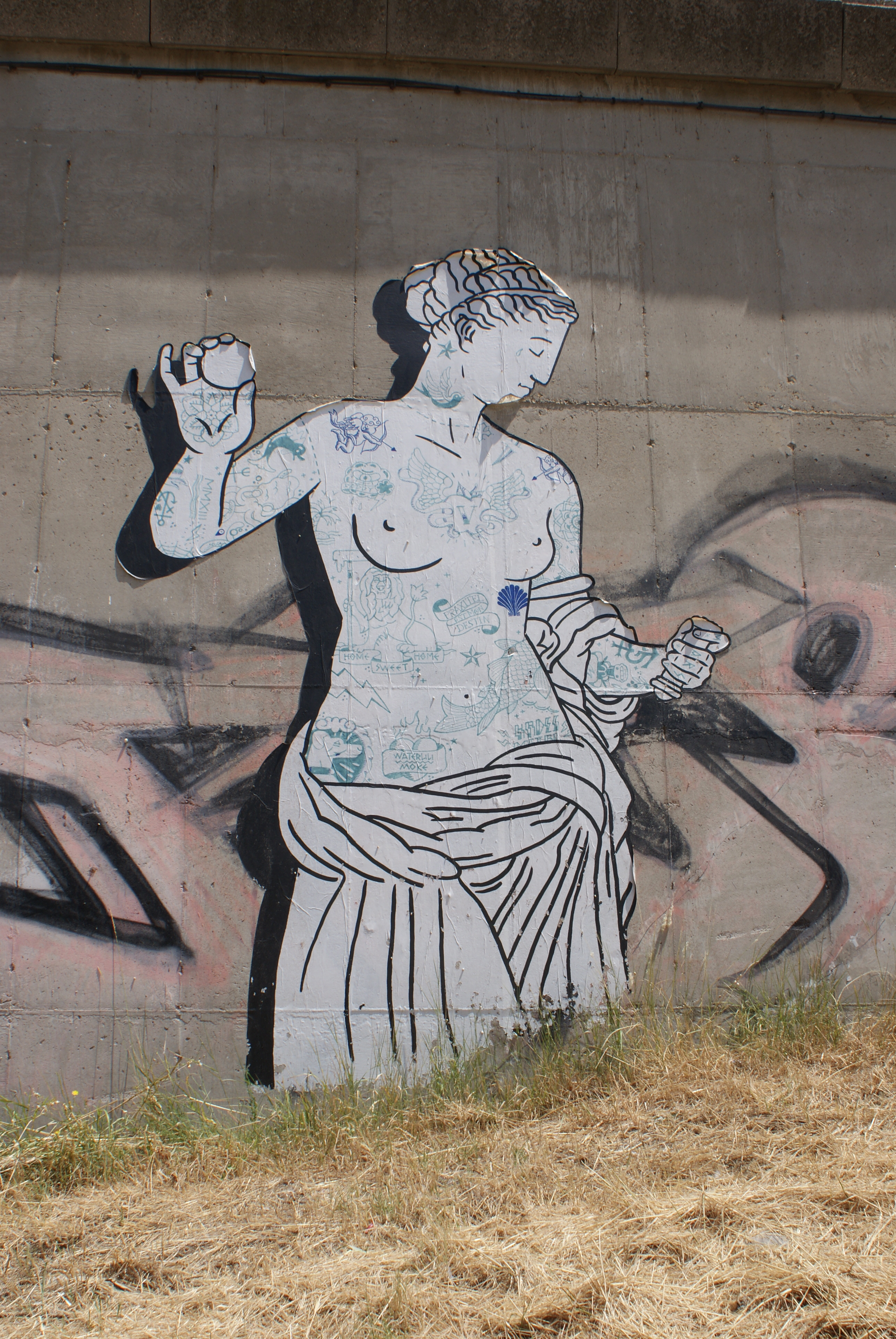 Graphe papier représentant la Vénus d'Arles, sur le flanc de la rocade d'Arles, à proximité immédiate du Musée de l'Arles Antique dont la Vénus d'Arles est l'emblème, au moment de l'exposition « Rodin, la lumière de l'antique », se tenant en 2013 dans le dit musée en présence de la Vénus originale du Louvre